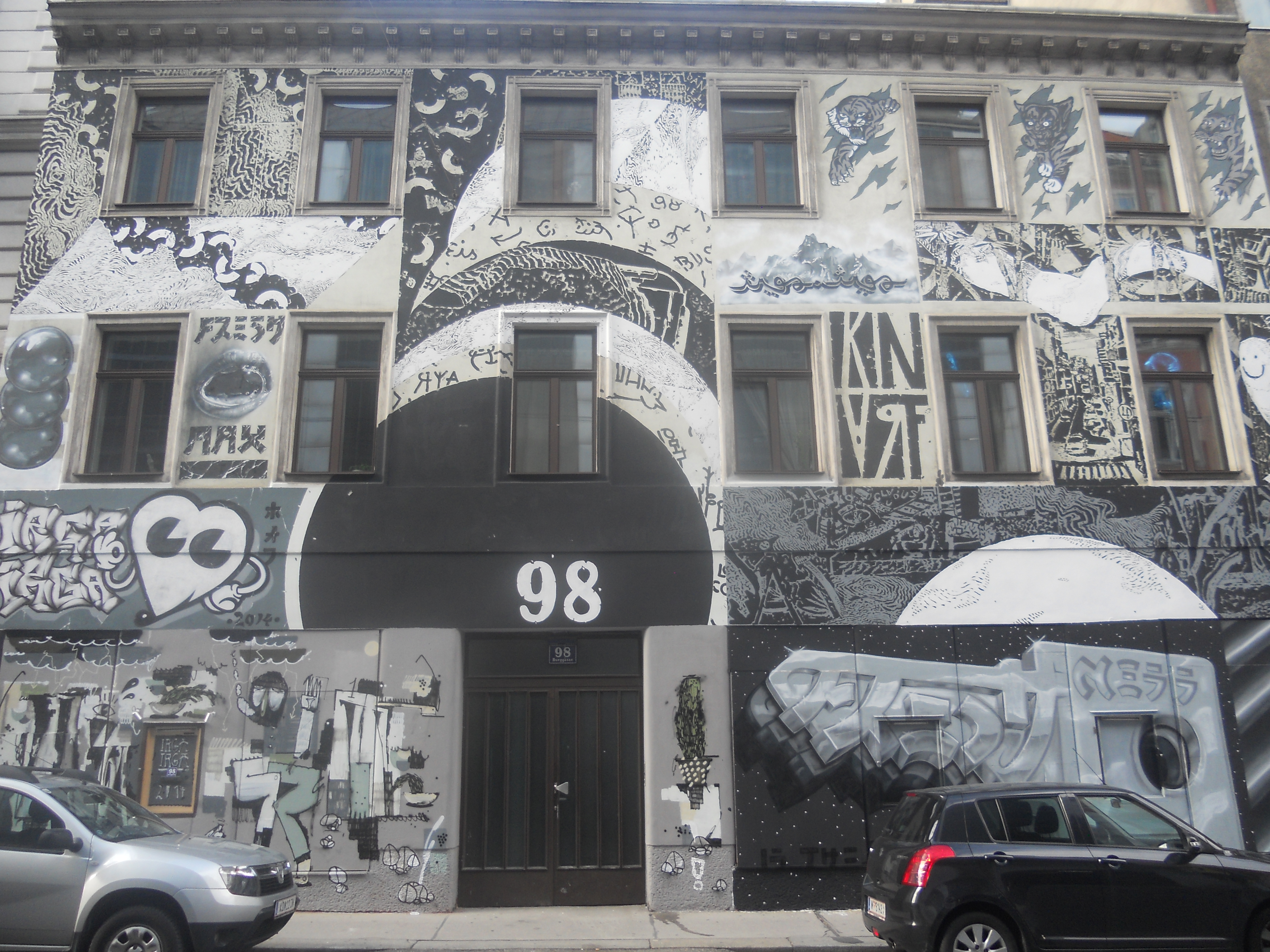 Haus Burggasse 98, die Fassade wurde 2014 von einem Graffiti-Künstlerkollektiv gestaltet.